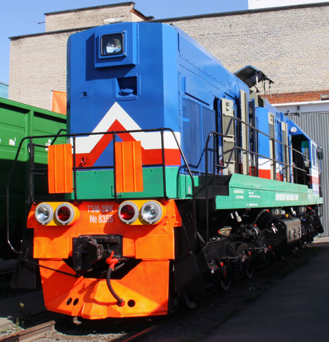 Тепловоз ТЭМ2, модернизированный на Кировском машзаводе 1 мая. EXPO1520 в Щербинке, 2011г.